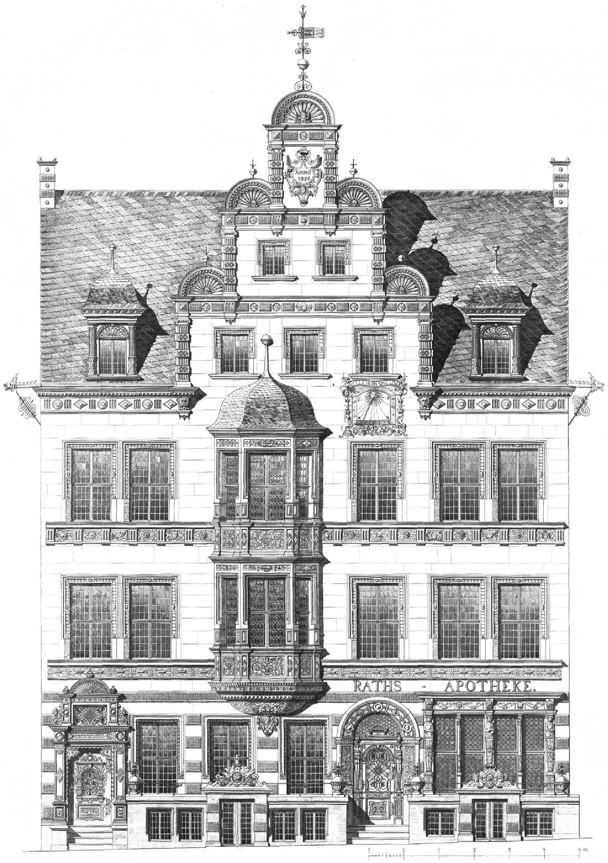 Raths-Apotheke in Bremen : Hauptansicht von der Marktseite (Kupferstich)